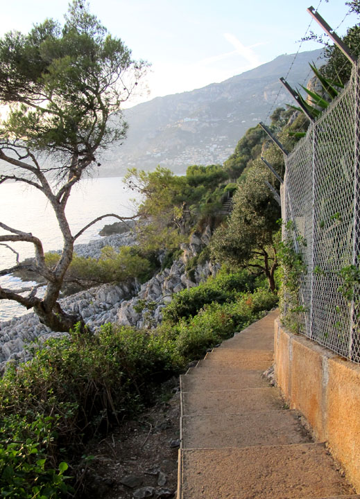 Promenade Le Corbusier au Cap Martin, entre Menton et Monaco,PACA, France